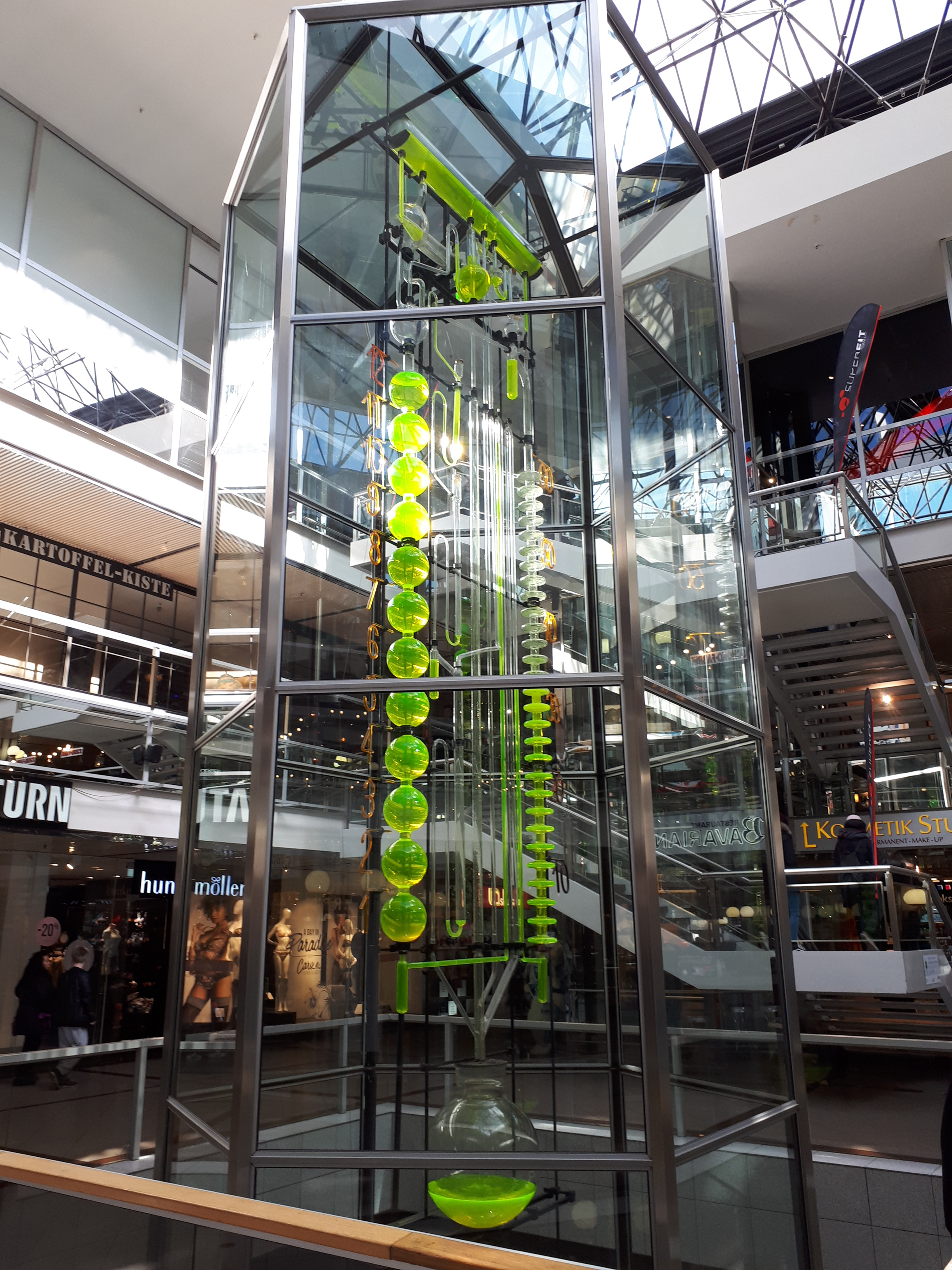 Charlottenburg Europacenter Uhr der fließenden Zeit